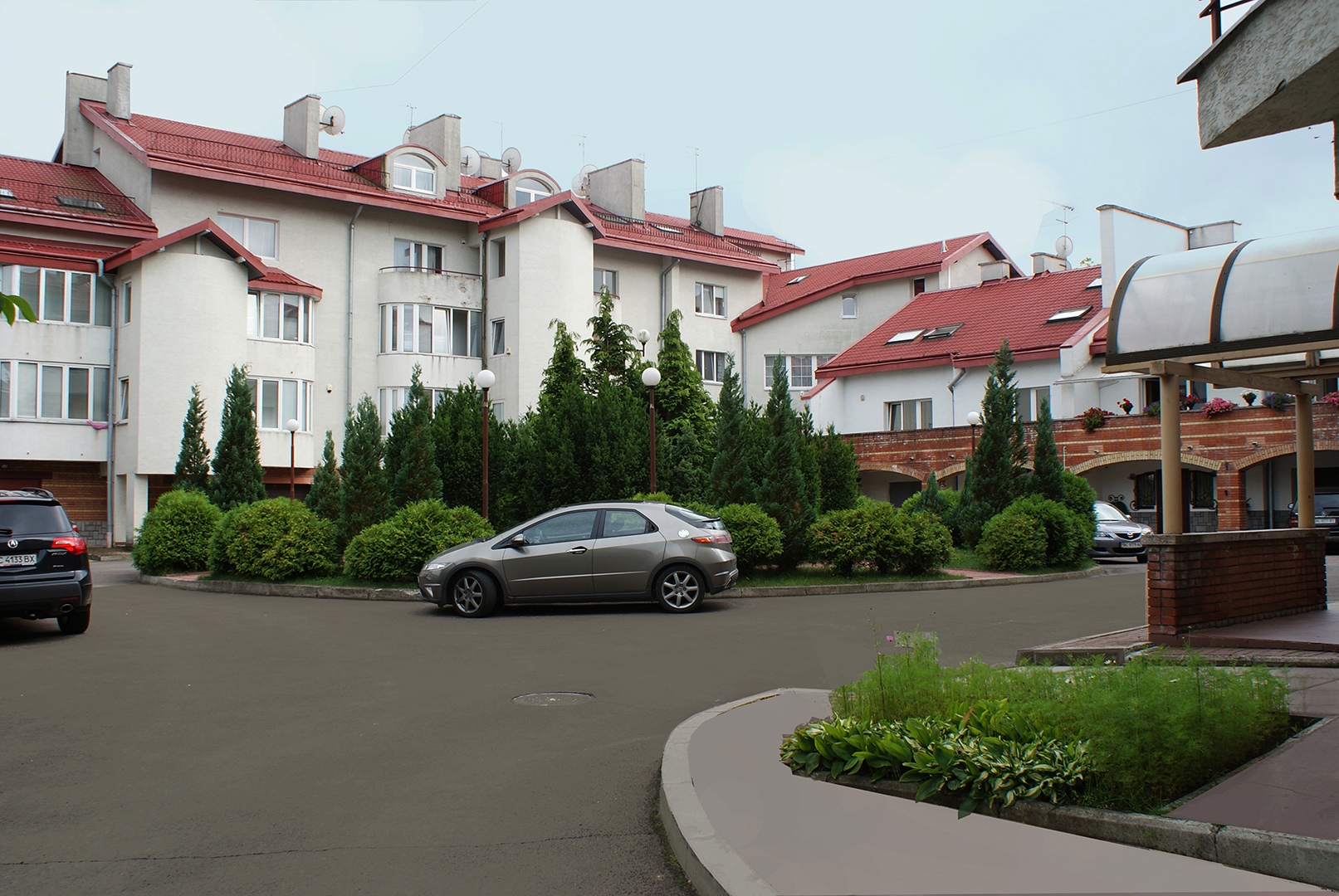 Житловий комплекс на 29 квартир по вул. Повстанській у м. Львові- 1998-2000р.(у співавторстві з інженером-конструктором Б. Наумовим)